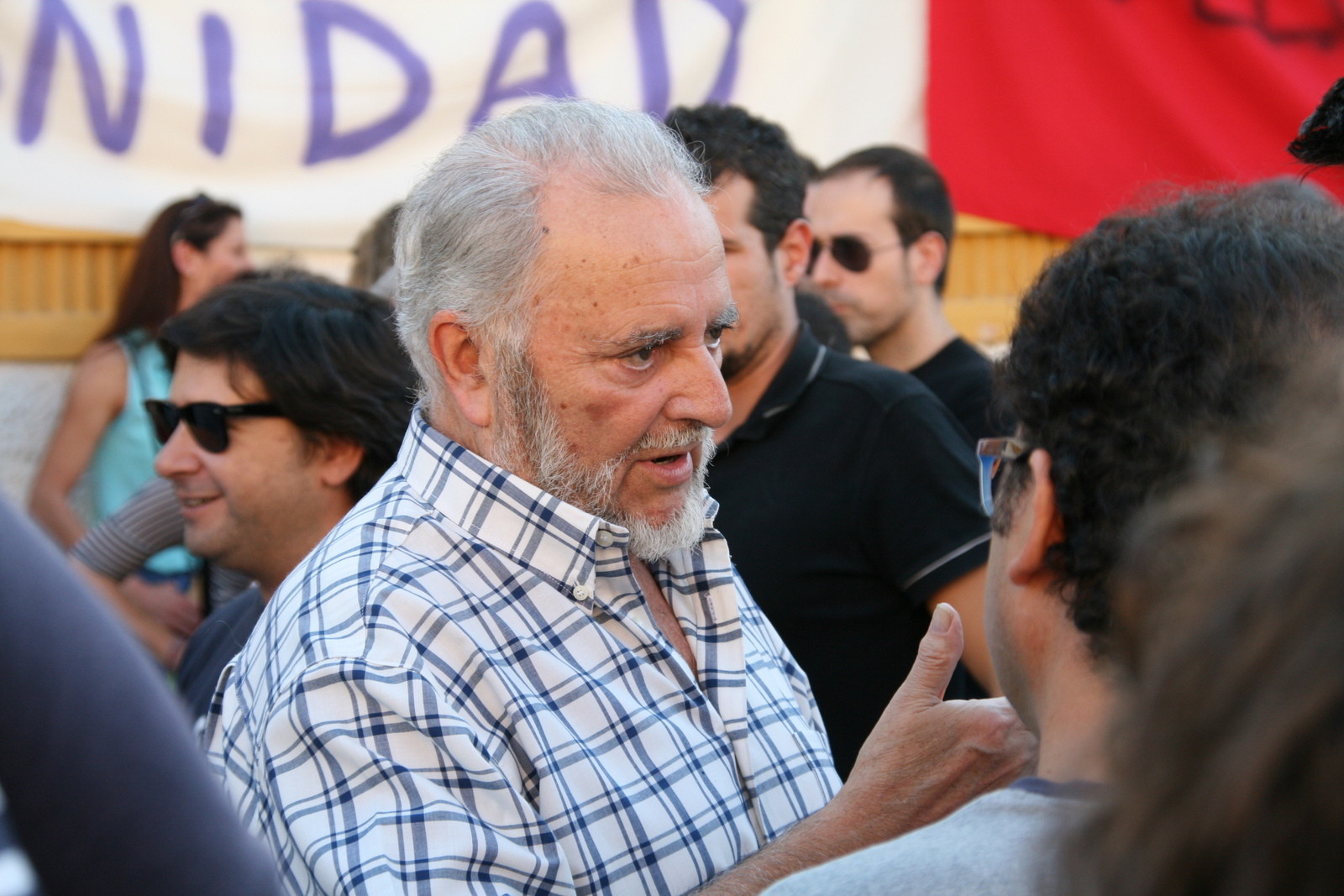 Julio Anguita en la ocupación del Colegio Rey Heredia, Córdoba (España).